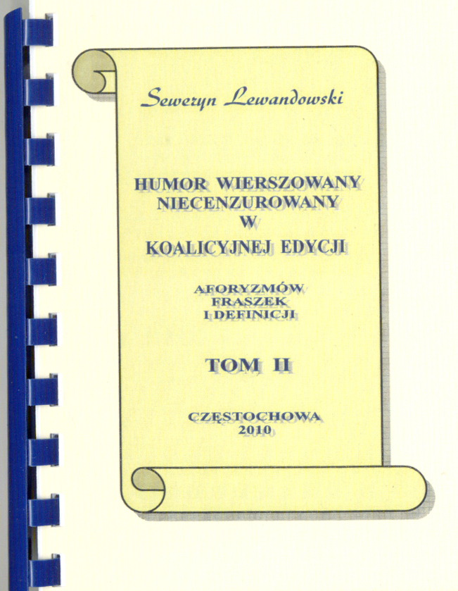 Humor wierszowany ... Tom II